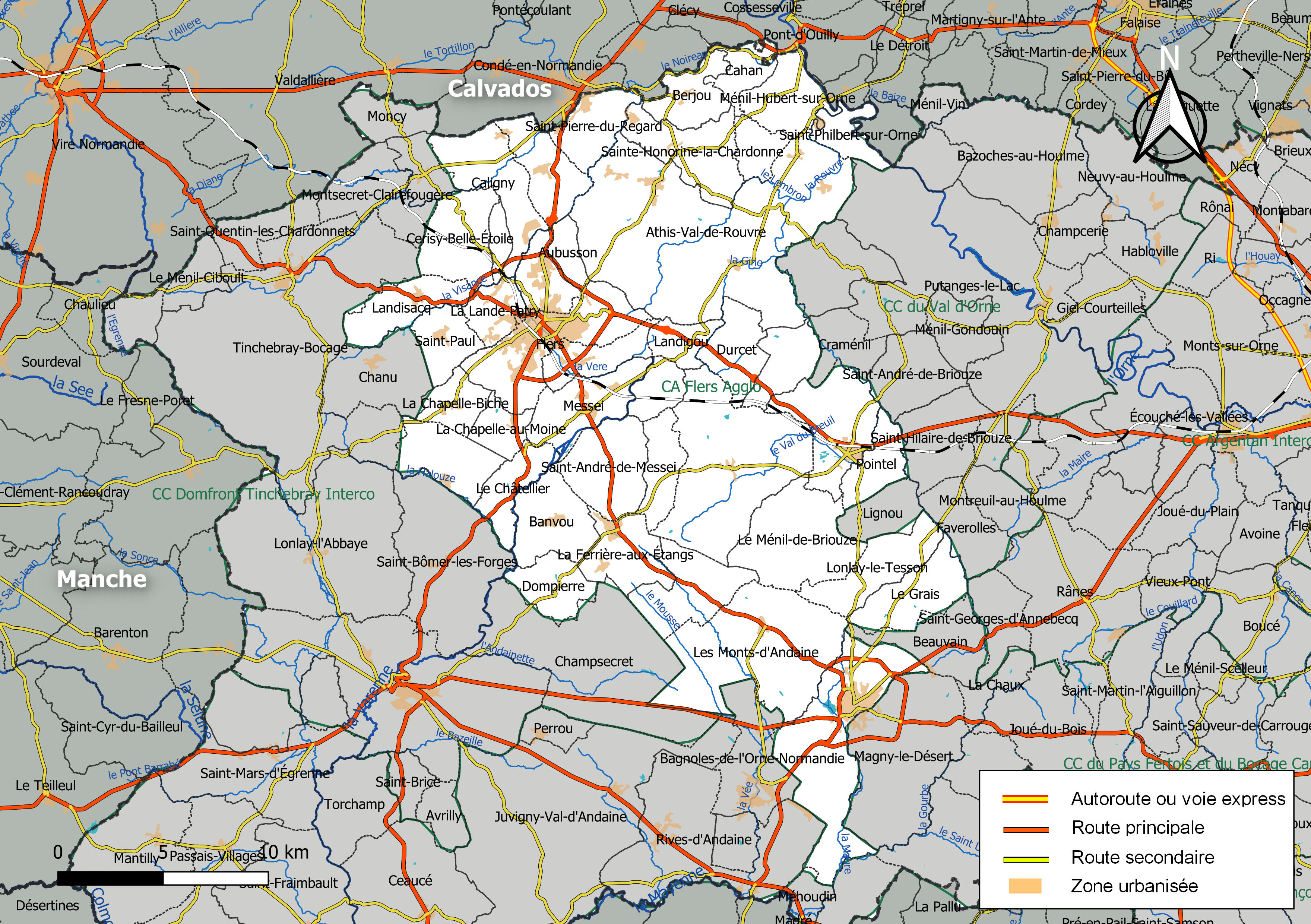 Carte géographique de l'intercommunalité Flers Agglo, département de l'Orne, France. Composition au 1er janvier 2019.